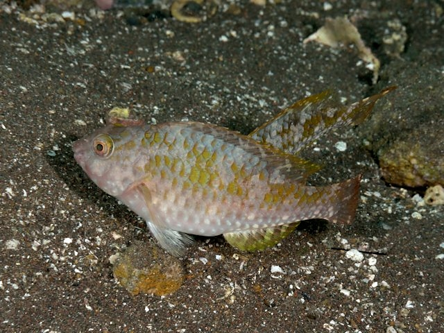 ブダイ Calotomus japonicus